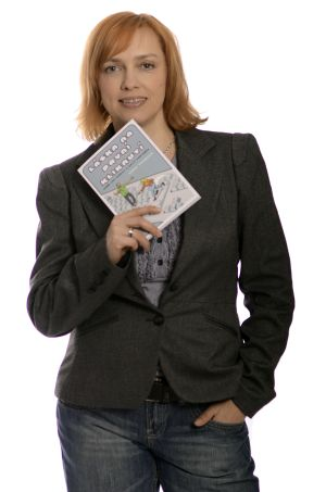 Česká spisovatelka a tajemnice Vysoké školy obchodní a hotelové v Brně.